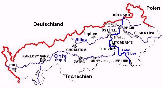 Flüsse und Städte in Nordböhmen (Tschechien) Ergänzungen (u. a. Flussnamen, Städte - Terezin und Teplice) von Benutzer:Leonce49 auf der Grundlage des Bildes Mapaohre.jpg von Zeichner/Urheber: Vaclav.prasil Tschechische Wikipedia, Artikel Ohře